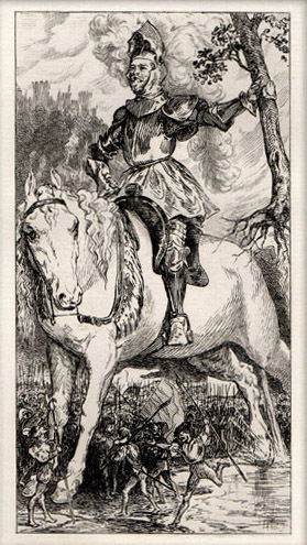 La Jument de Gargantua urine sur ses adversaires. Gravure sur acier anonyme, 1840.